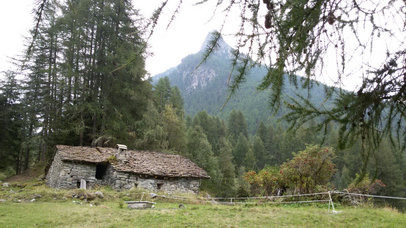 Val clavalité